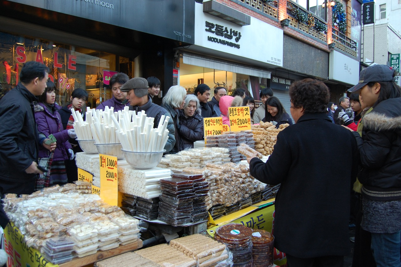 Insadong